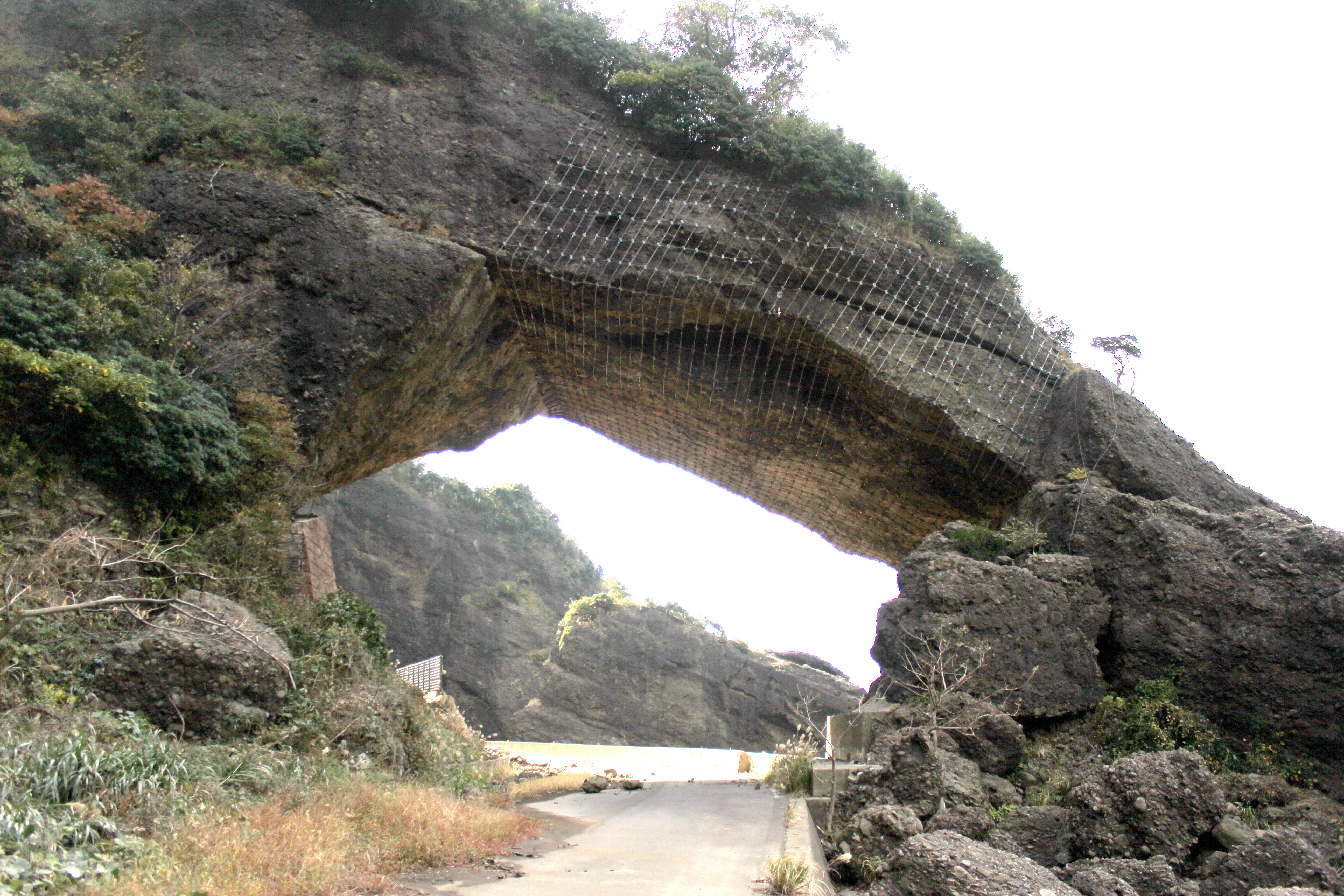 呼鳥門 2015